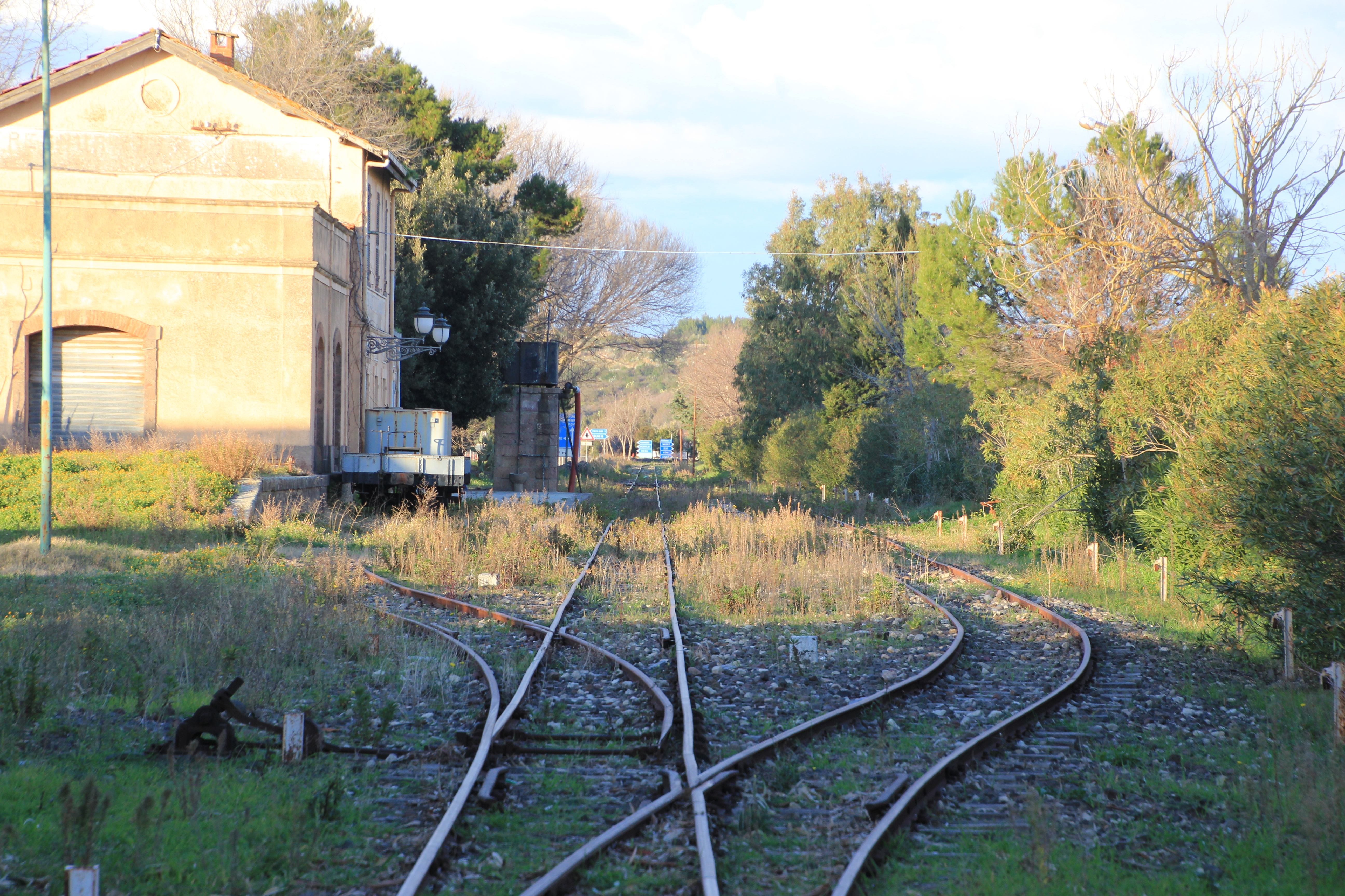 Tresnuraghes, stazione ferroviaria